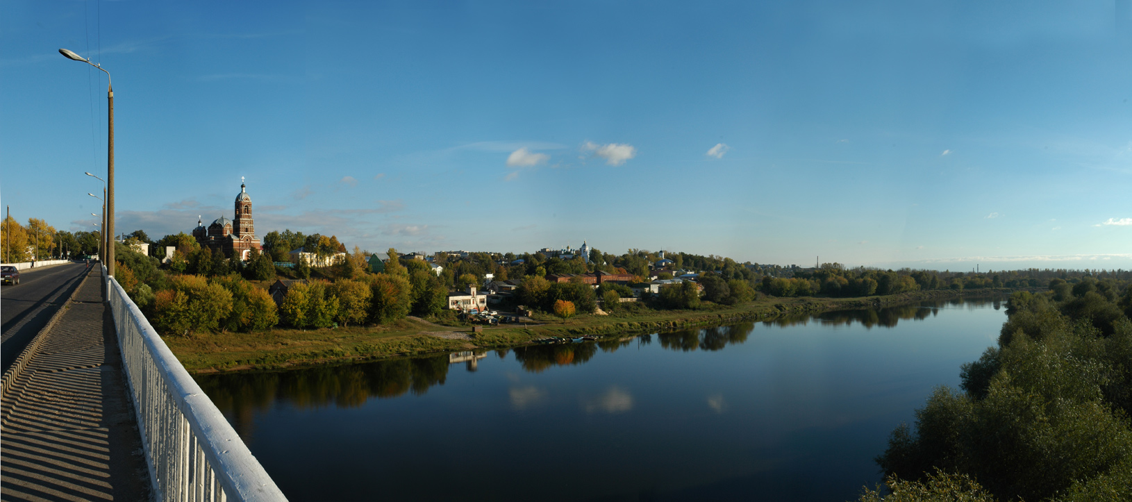 Собор Спасо-Преображенский (Владимирская область, Ковров, Першутова улица, 28)